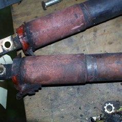 Следы воздействий частичных разрядов в изоляции